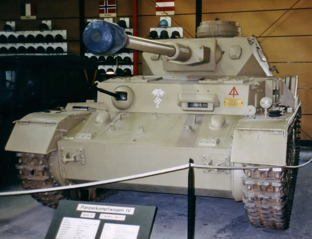 Panzerkampfwagen IV Ausf. G, ausgestellt im Panzermuseum Munster Gut zu sehen sind die zwei abgedeckten Sichtöffnungen in der Turmstirnwand, die kleine Öffnung des Zielfernrohres, der Glasbaustein des Fahrervisieres mit den darüberliegenden Bohrungen für das Fahrerperiskop und die zwei Wartungsdeckel auf der flachen Bugpanzerplatte mit den kleinen Entlüftungshutzen für die Lenkbremse